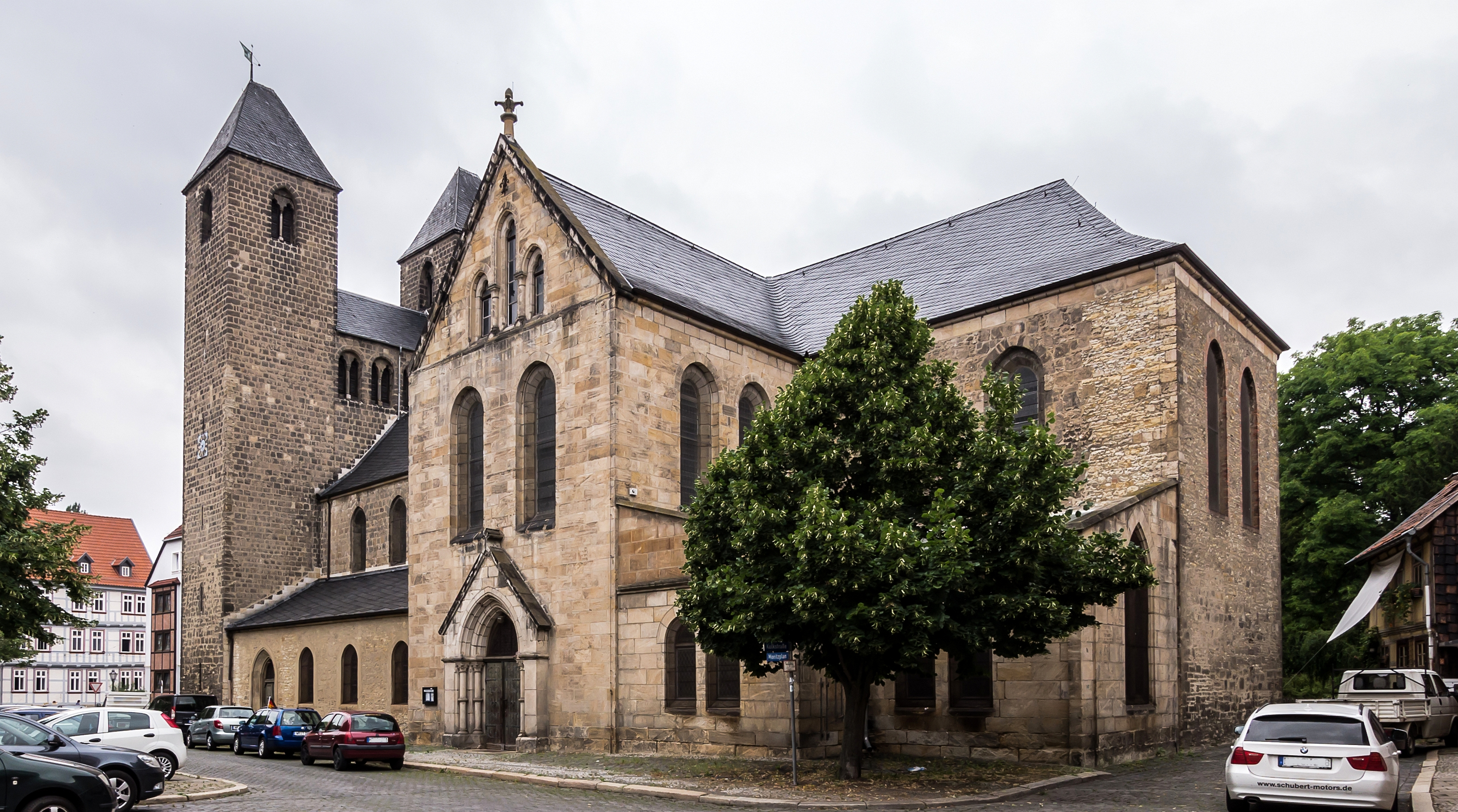 Halberstadt Moritzplan Kirche